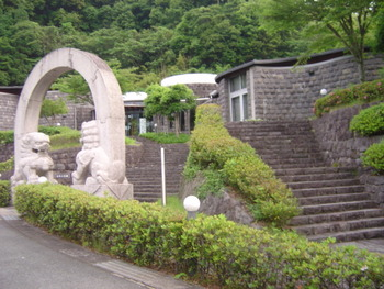 熊本東陽町